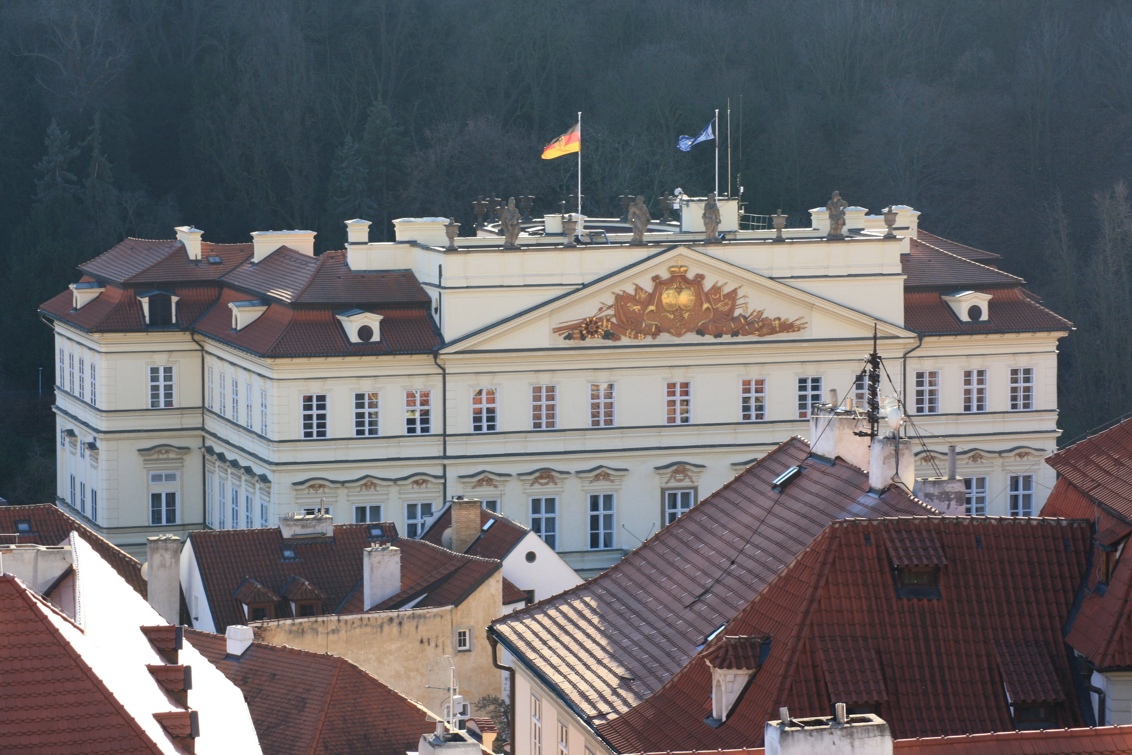 Lobkowicz Palais (Deutsche Botschaft)